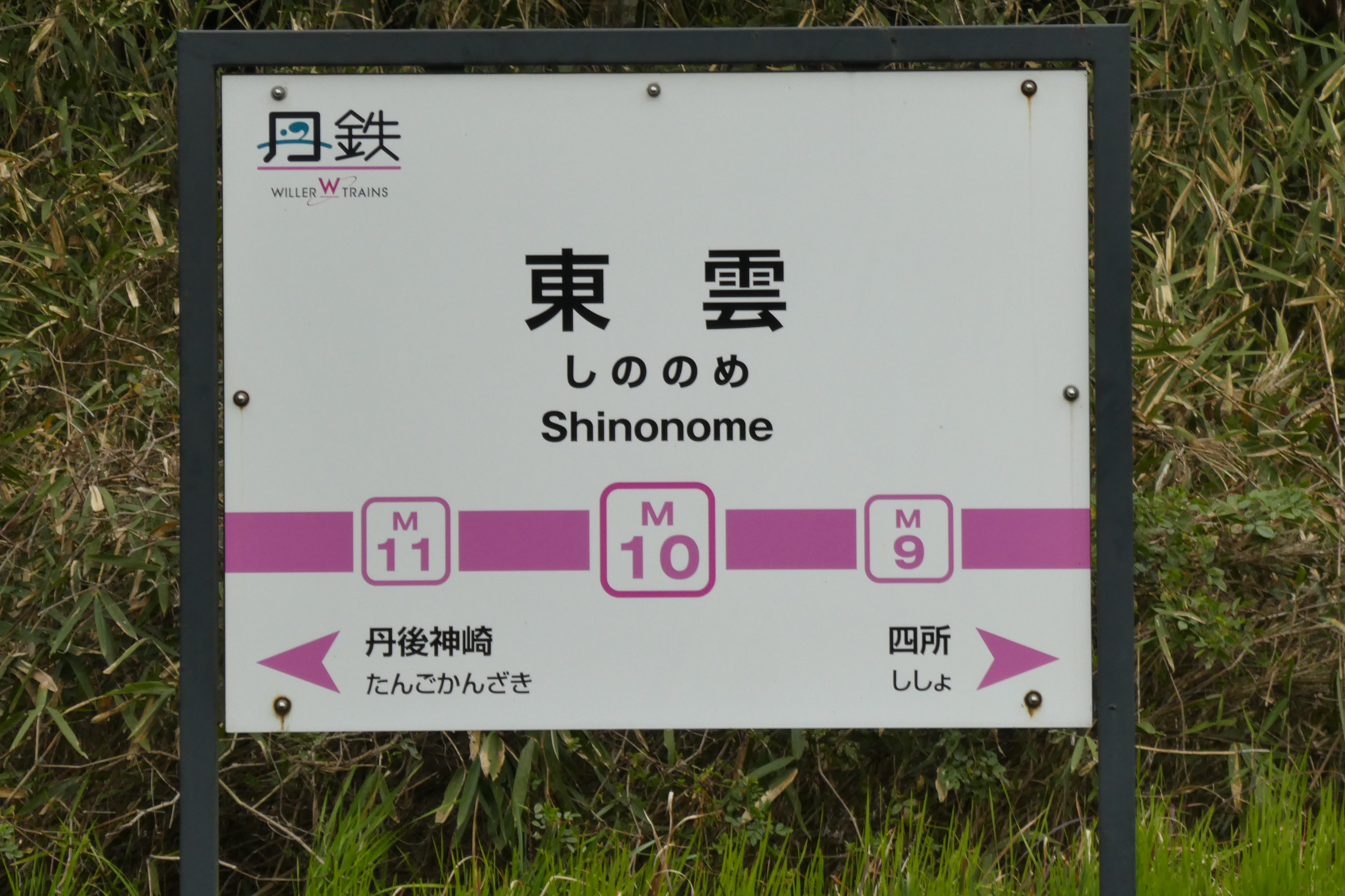 東雲駅 駅名標